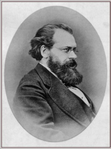 Попов Нил Александрович (1833–1891), русский историк, славяновед, архивист, чл.-корреспондент АН (1883)